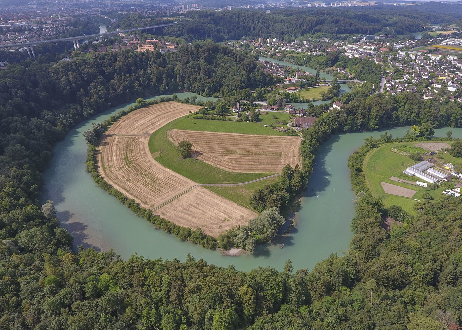 Luftbild der Halbinsel Schlossguet in Bremgarten bei Bern, aufgenommen von oberhalb der Engehalbinsel